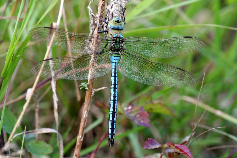 Libelle sitzend